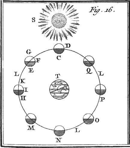 Rozier, François, Cours complet d'Agriculture, tome 6, planche 7, figure 16